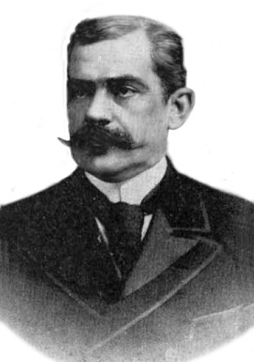 Elías Fernández Albano (Santiago; 1845- 6 de septiembre de 1910). Abogado y político chileno, vicepresidente de Chile en 1910.